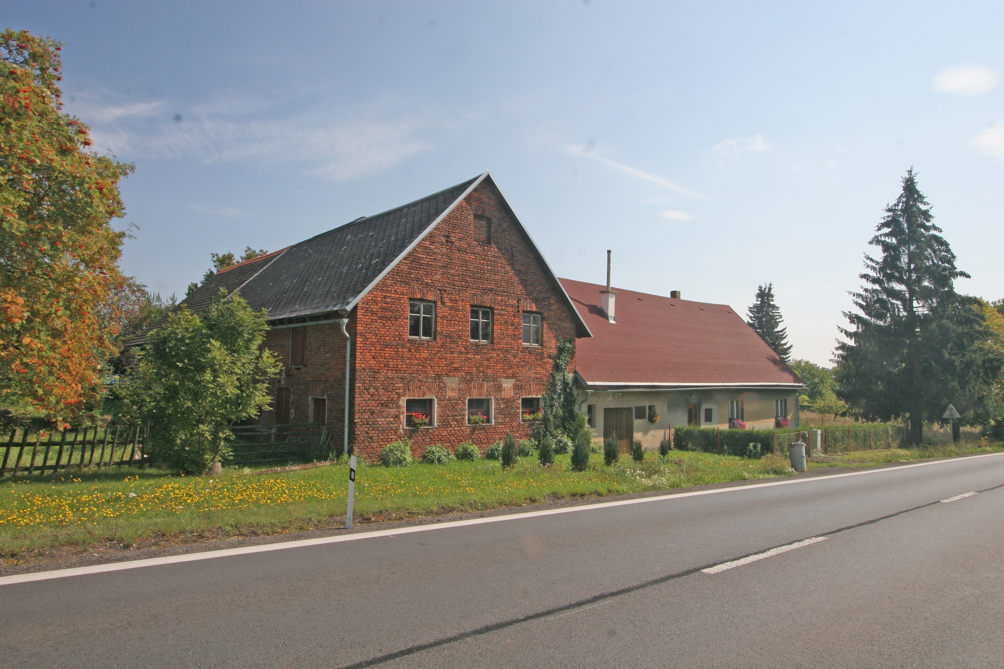 Nový Rokytník čp. 18